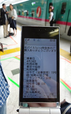 モバイルSuica特急券 「購入案内のご案内」メール